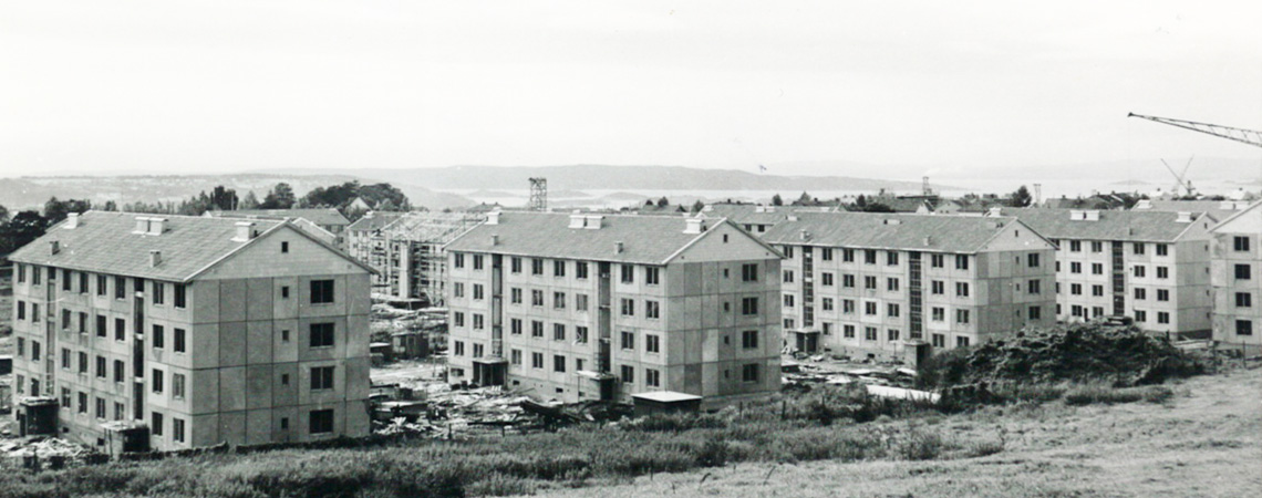 Boligbyggelaget Usbl på Årvoll tidlig på 50-tallet.